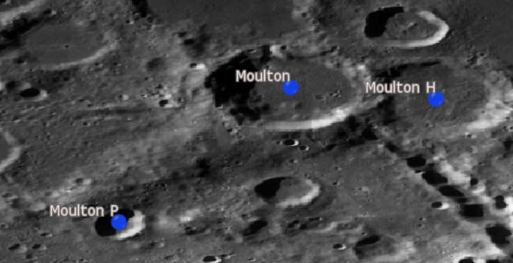 Cráter lunar Moulton. Cráteres satélite. (Imagen LRO)